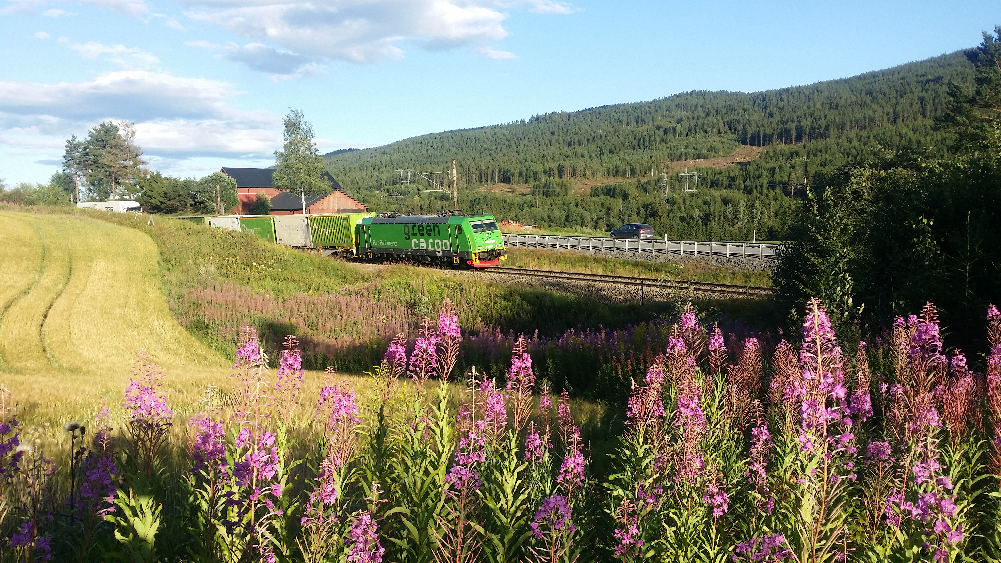 Green Cargo-godstog ved Sokna, Bergensbanen.